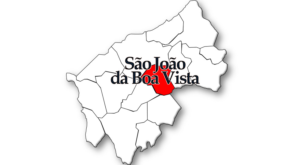 População